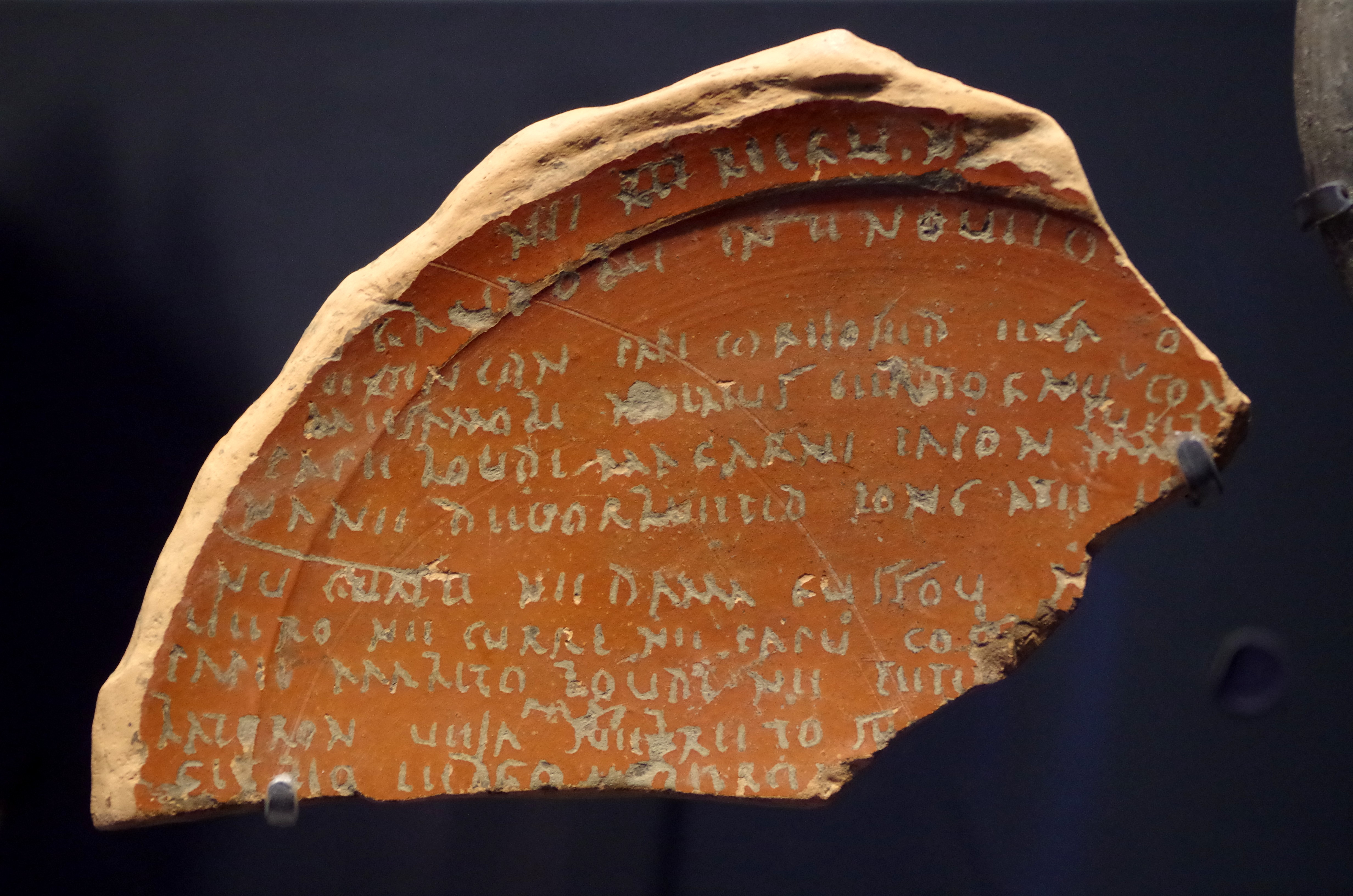 Le plat de Lezoux (Drag. 043) au musée de la Céramique de Lezoux.